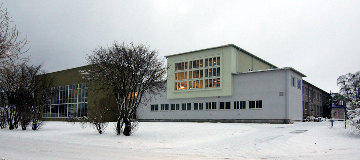 Skipsmodelltanken, Tyholt, Trondheim.